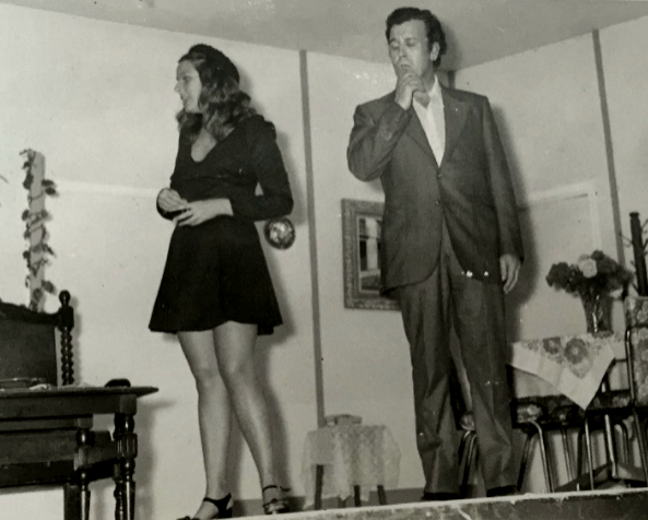 La actriz Loly Sanchez y Dante Carle en la obra de teatro la sopera de 1974 escrota por Miguel de Miura en el teatro de la Hermandad Gallega con el grupo Rosalia de Castro, bajo la dirección de Manuel Calzada.